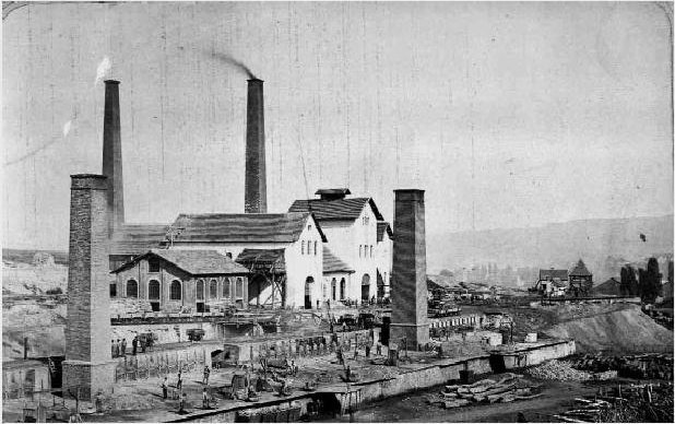 Grube König (Neunkirchen, Saarland)